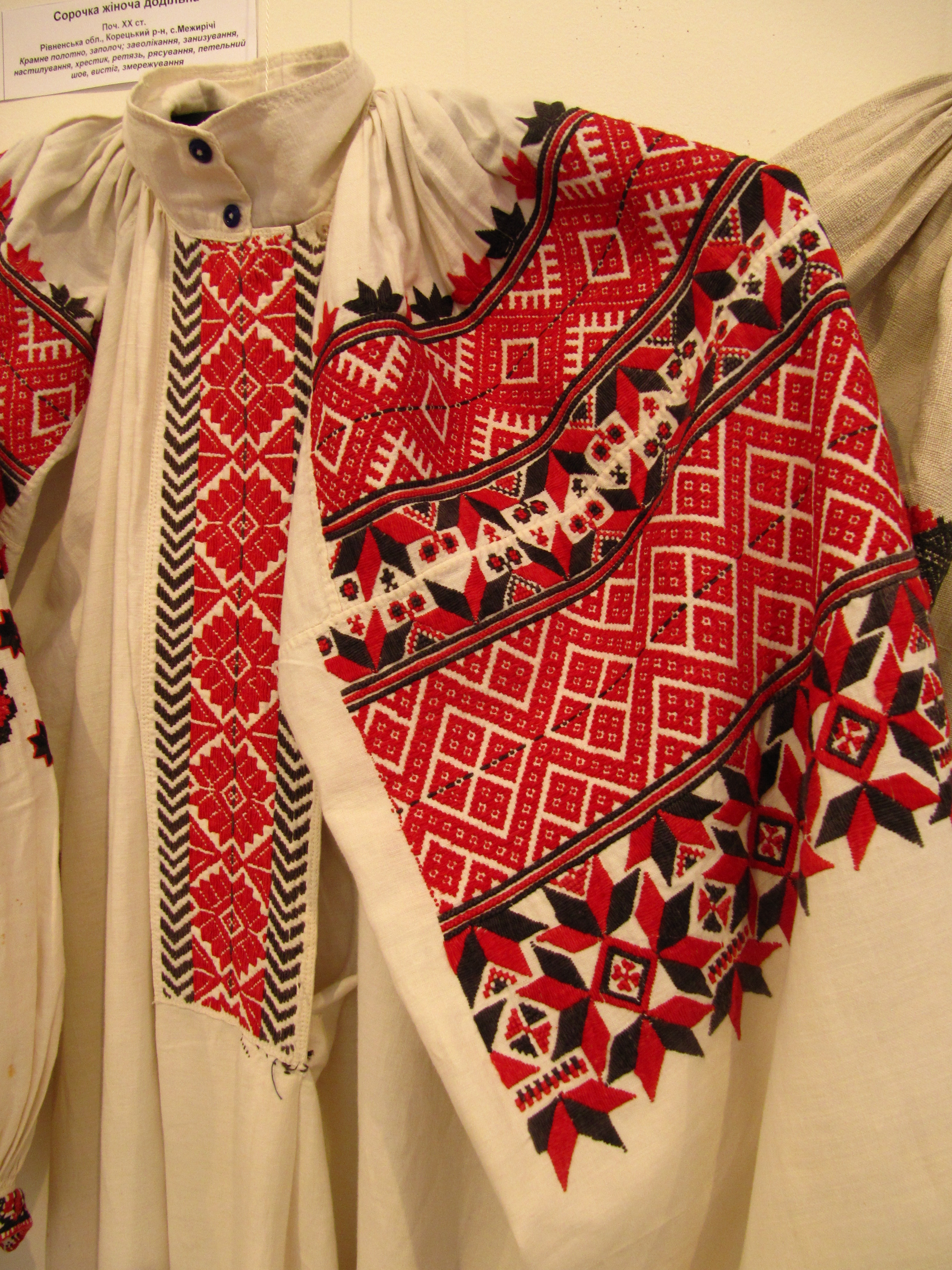 Жіноча додільна сорочка. Початок 20 ст. Рівненська обл. Корецький р. с. Межирічі. Виставка в музеї Івана Гончара (Київ).